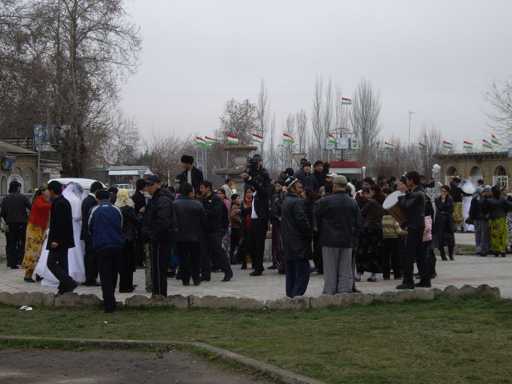 Bryllupper i Shahrinav, Tadsjikistan. Efter borgerlig vielse drager brudeparret med gæsterne til Shahrinavs centrale torv og fejrer vielsen i det offentlige rum med musik og dans. Orkesteret består her af en klarinettist og 2-3 håndtrommeslagere, som spiller folkemusik i 4/4 og 8/8-takter. På billedet er hele tre bryllupsoptog ved at fejres. Efter den offentlige defilering på torvet drager bryllupsgæsterne videre til indendørs fest under private former, enten hjemme hos familien eller på restaurant.